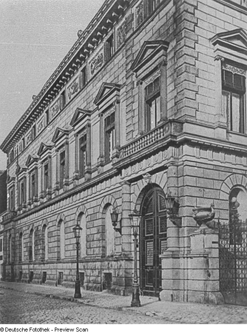 Palais Oppenheim (Palais Kaskel-Oppenheim) war ein Gebäude im Stil der Neorenaissance in Dresden. Es wurde 1845 bis 1848 von Gottfried Semper für den Bankier Martin Wilhelm Oppenheim (1781–1863) erbaut und befand sich an der Bürgerwiese 5–7. SLUB/Deutsche Fotothek der Sächsische Landesbibliothek - Staats- und Universitätsbibliothk Dresden